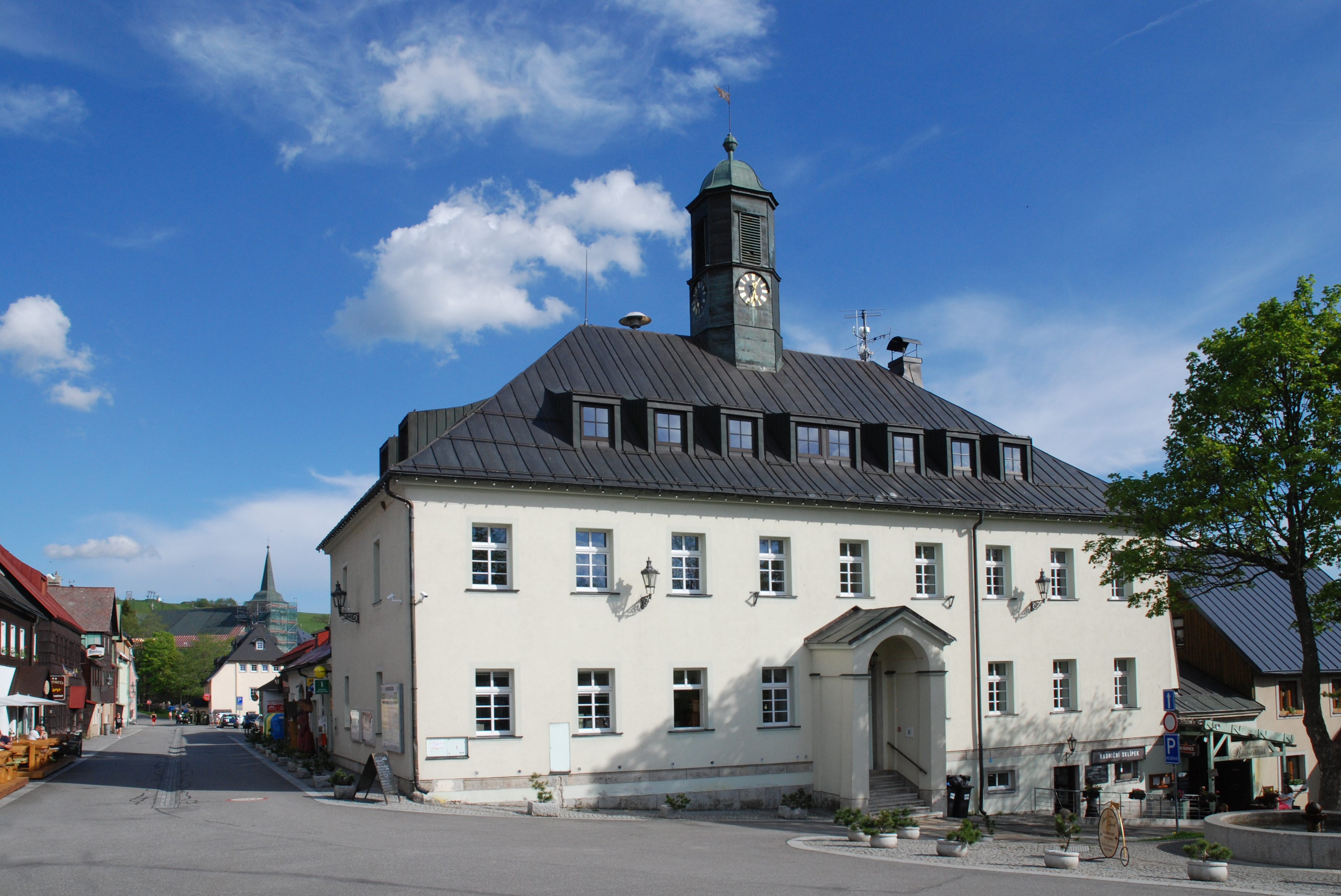 Budova radnice v obci Boží Dar, v pozadí kostel svaté Anny